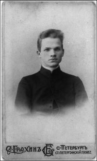 Антоні Ляшчэвіч у часы навучання